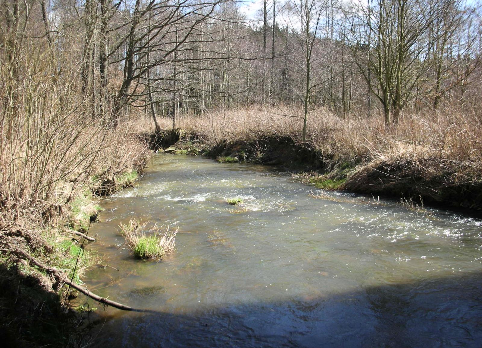 Fleißenbach bei Hartoušov